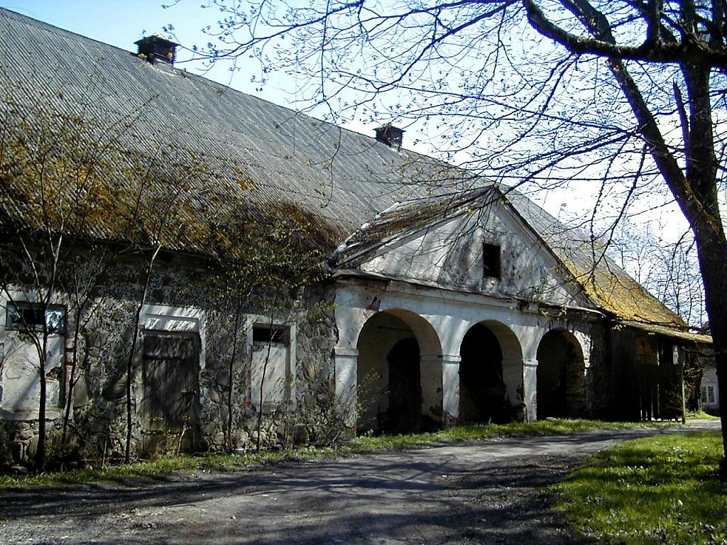 Vecsalacas muižas saimniecības ēka 2002-05-01